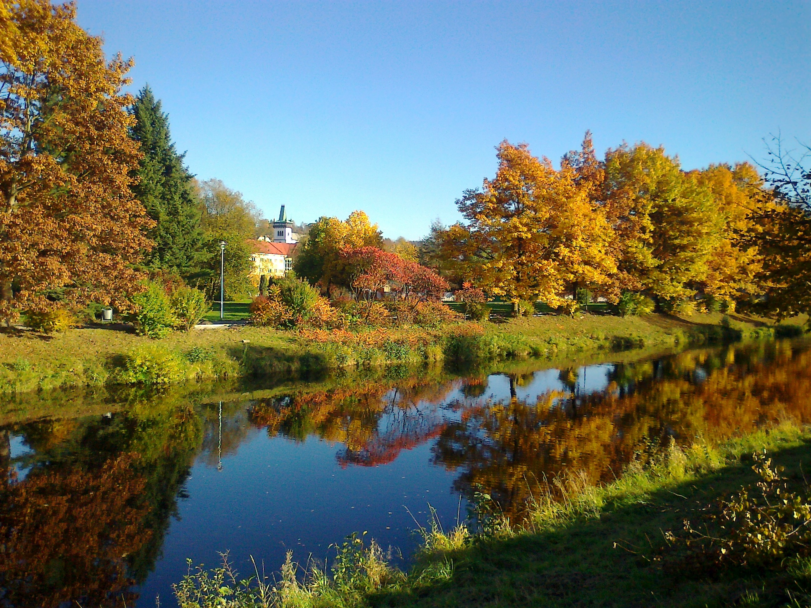 podzimní Semily